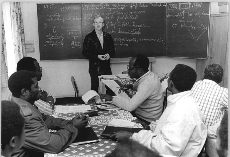 Bernau, Klasse der Gewerkschaftshochschule ADN-ZB Settnik 22.7.86 Bez. Frankfurt-Oder: Ausländerausbildung an der Gewerkschaftshochschule "Fritz Heckert" - Eine wichtige Aufgabe der Gewerkschaftshochschule ist die Vermittlung von theoretischem Rüstzeug an ausländische Kader, damit diese in ihrer Heimat führende Positionen beim Aufbau und der Leitung von Gewerkschaften übernehmen können. Ihre Solidarität beweisen die Dozenten aber nicht nur durch ihre Tätigkeit in Bernau. Bisher waren 24 von ihnen in 39 Ländern 104 mal im Einsatz. In den zurückliegenden 27 Jahren erhielten rund 3 300 Gewerkschafter aus über 90 Staaten eine Ausbildung in Bernau. 119 Absolventen aus elf Ländern konnten ein Diplom erhalten. Finanziert wird das Studium durch die monatlichen Spenden der Mitglieder des FDGB.